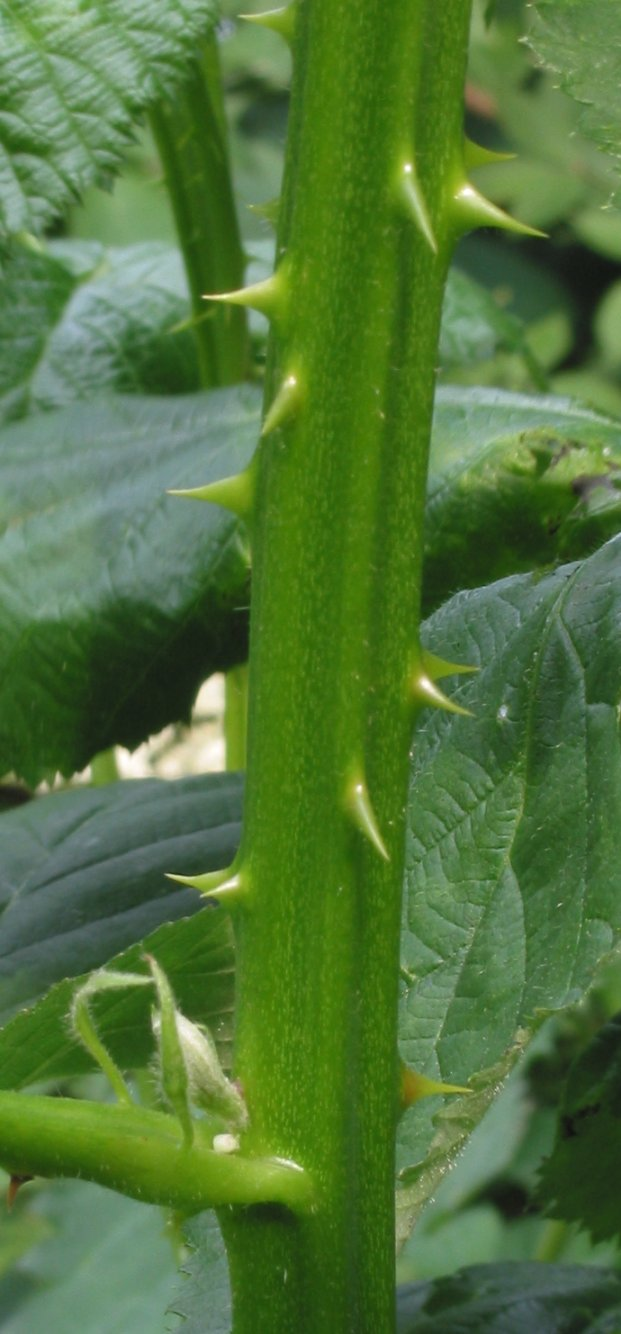 zelfgemaakte foto. GFDL. Gestekelde stengel van braamras Himalaya